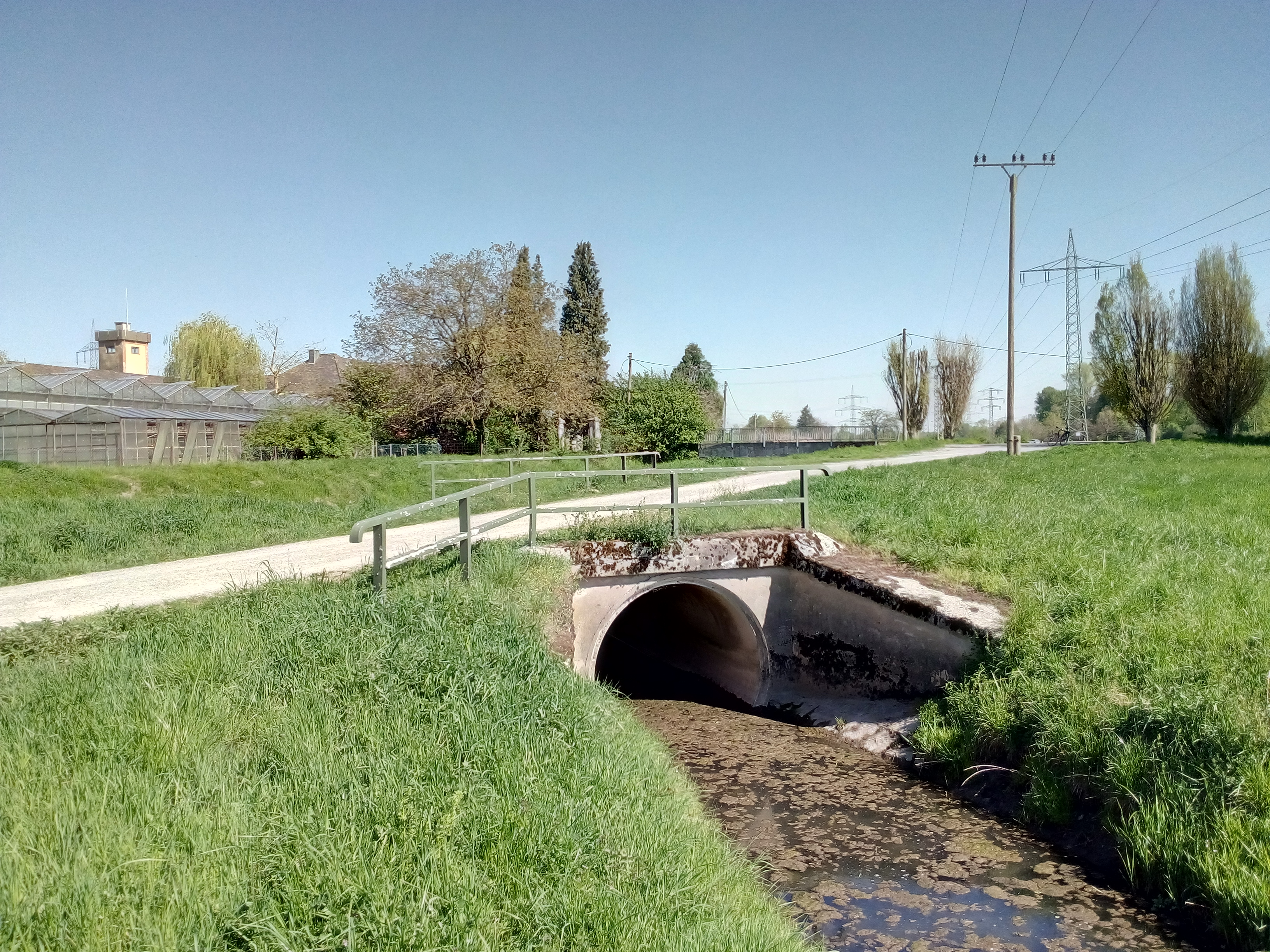 Sinzheimer Dorfbach an der Mündung in den Sandbach, im Hintergrund Wohnplatz Tiefenau